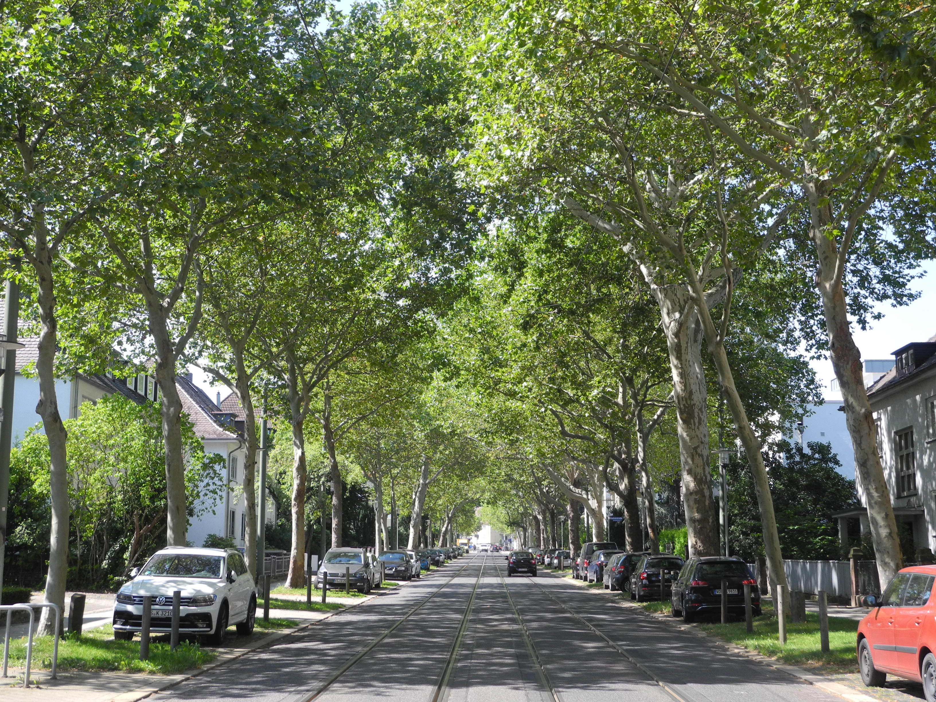 7000 Eichen – Stadtverwaldung statt Stadtverwaltung, eine soziale Plastik von Joseph Beuys, gestartet 1982 auf der documenta 7 in Kassel, Hessen, Deutschland. Standort: Landgraf-Karl-Straße Art: Ahornblättrige Platane (Platanus × acerifolia) Pflanzjahr: Ab 1986 mit einigen Altbäumen in der Straße Blick von Höhe Sachsenstraße Richtung Westen.